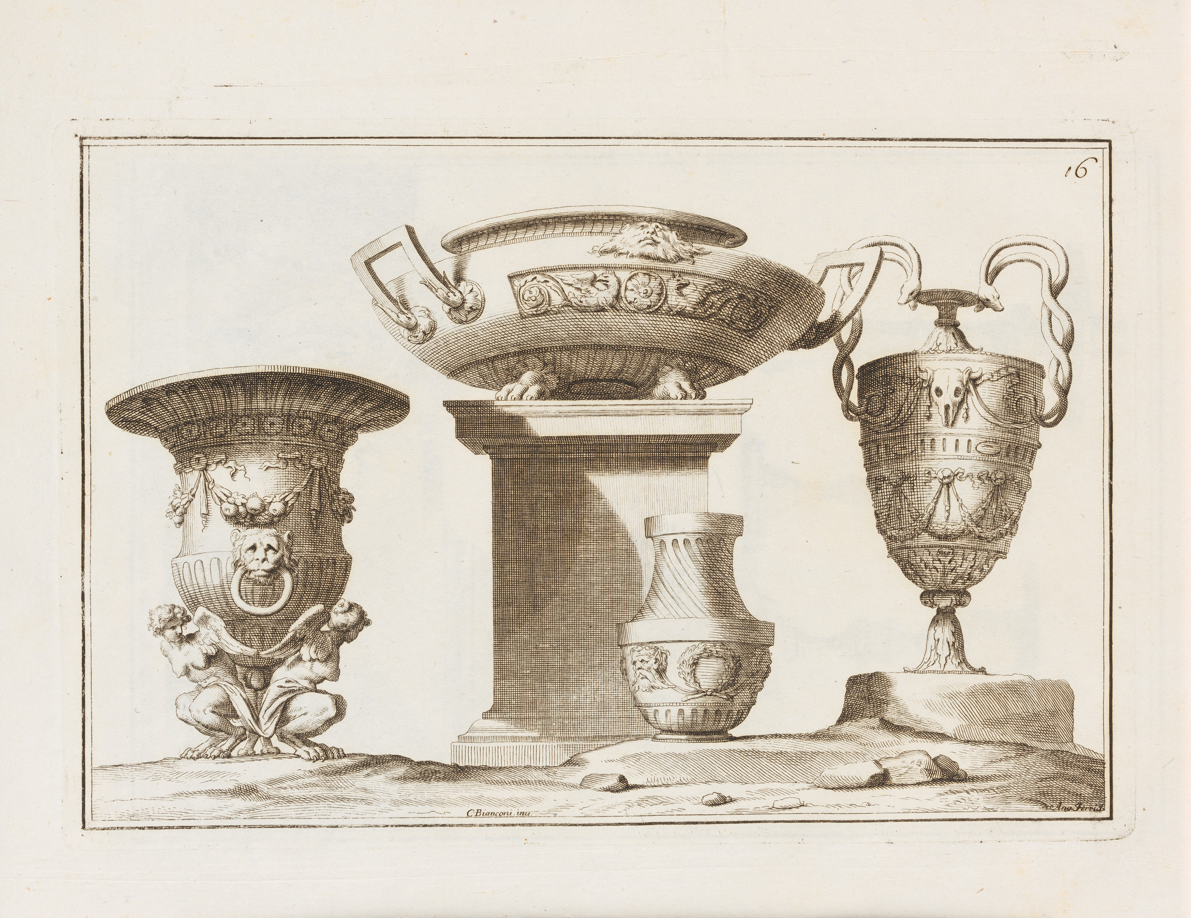 Book; Books